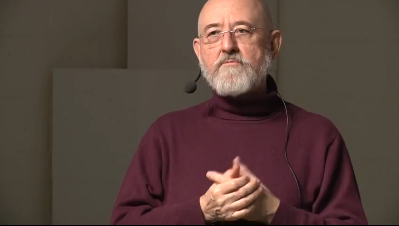 Captura de la conferència del director fundador del Global Media Research Center, John Downing, donant una conferència al MEDEA sobre els mitjans, la comuicació i el canvi social.